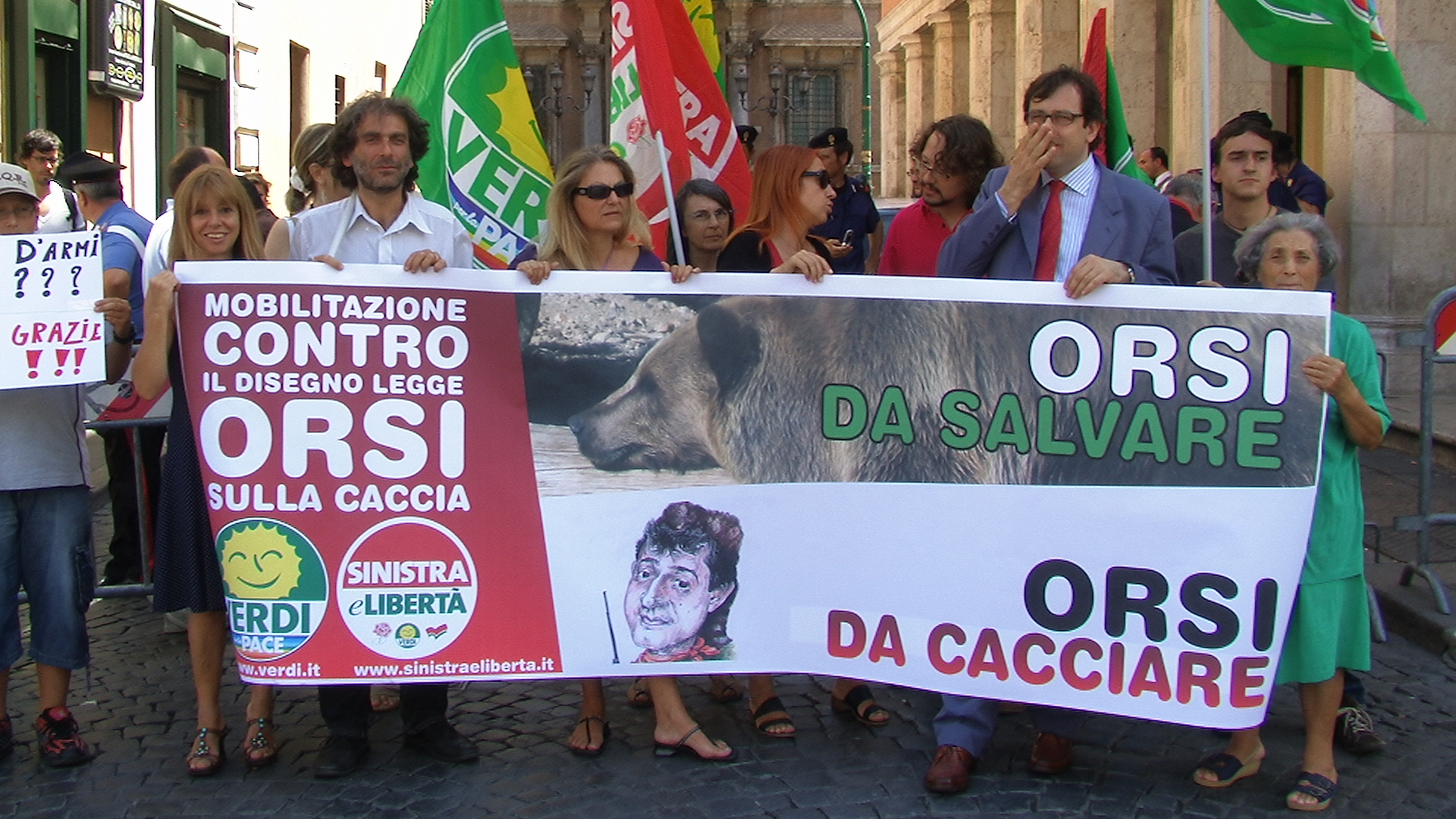 Sit-in contro il DDL Orsi, che rischia di far arretrare il nostro Paese liberalizzando la caccia. Si è tenuto il 21 luglio davanti al Senato.